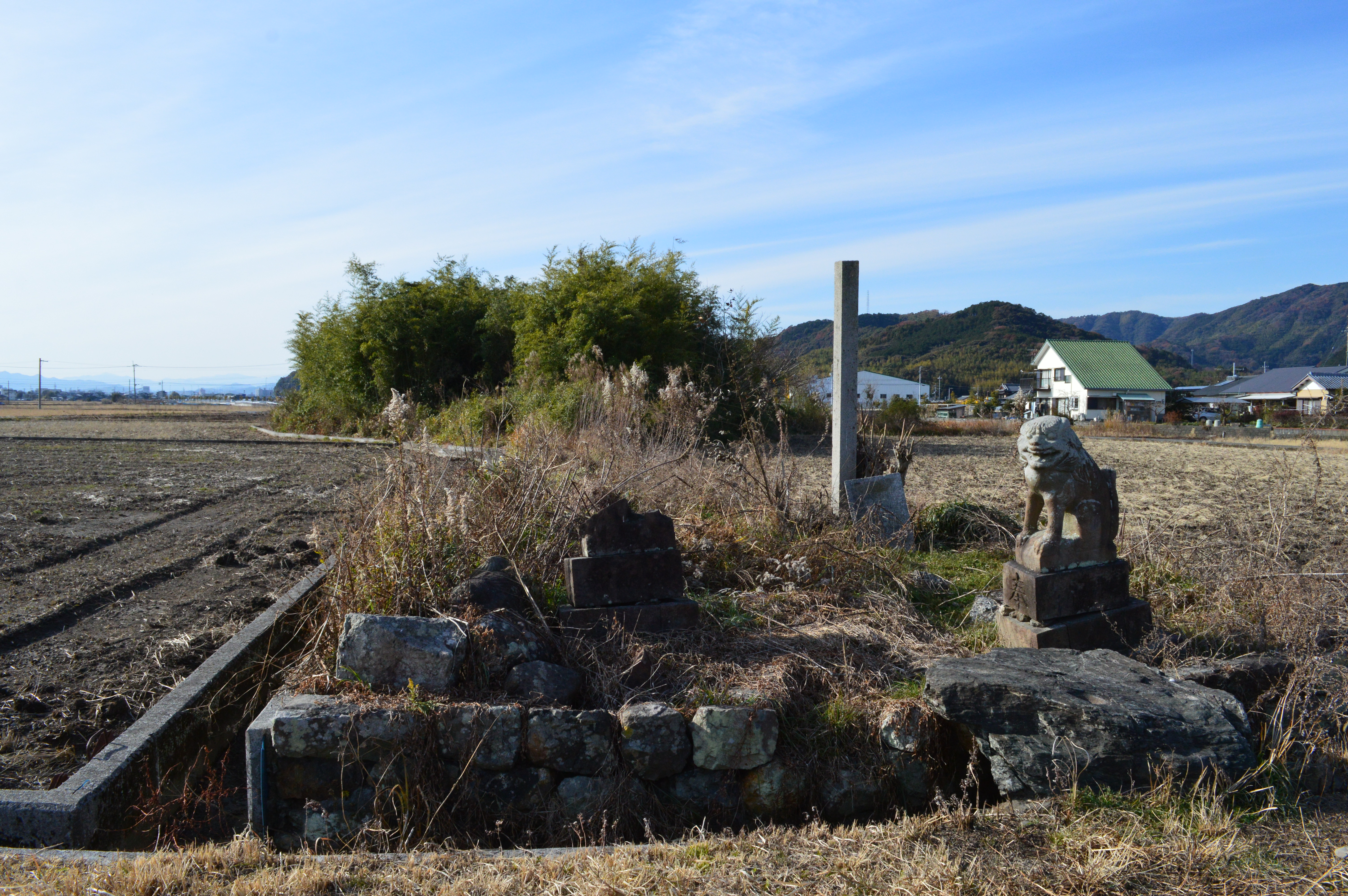 葛木咩神社 旧社地